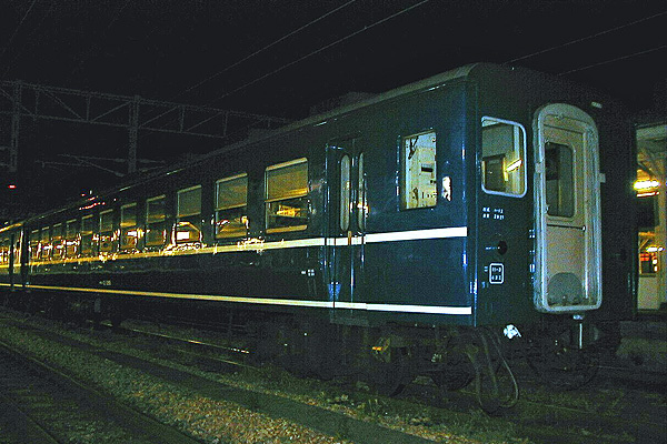 JR九州オハ12-1000(鳥栖駅)